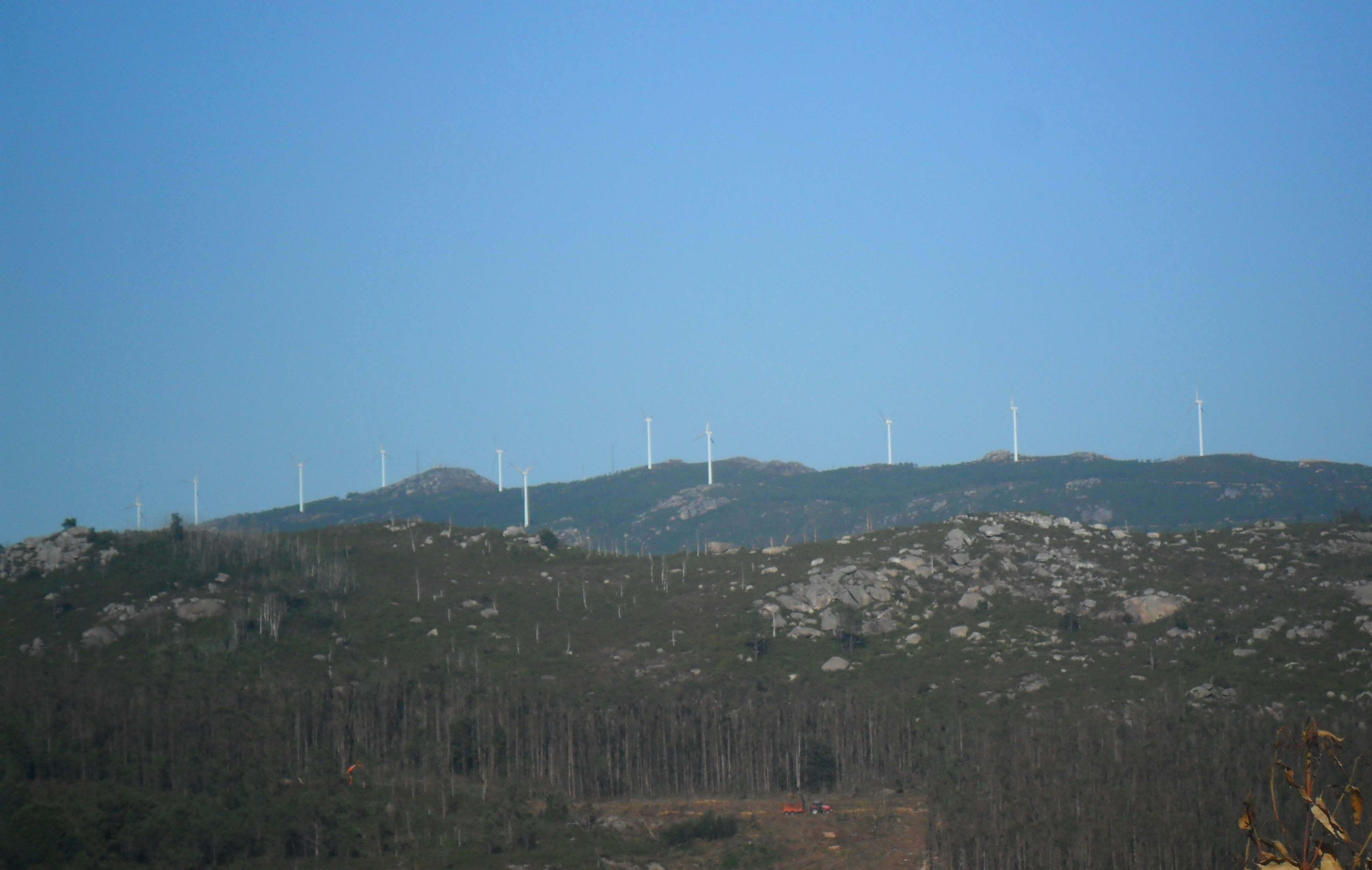 Monte de la Muralla, Galicia.